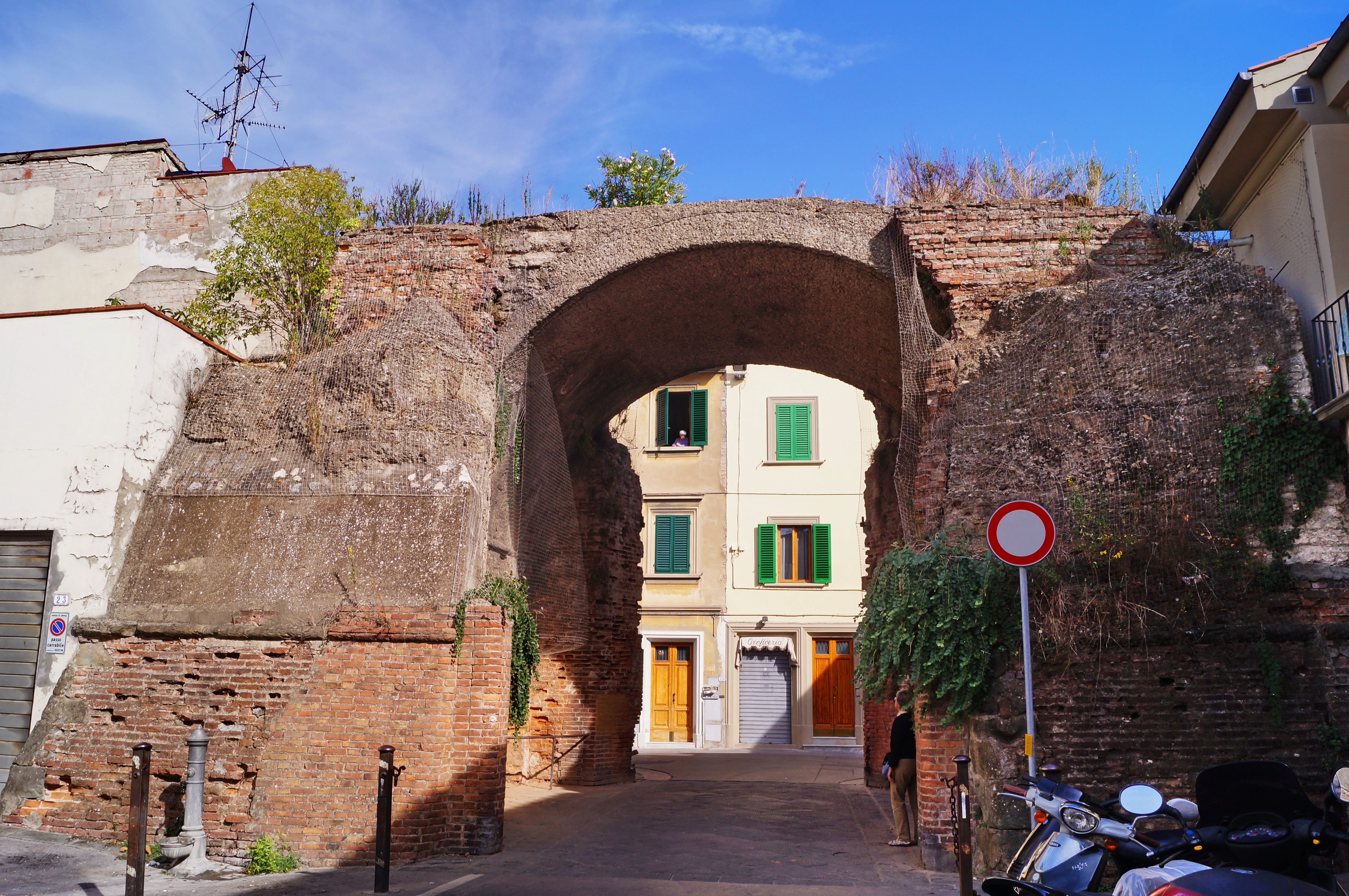 Porta Pisana This is a photo of a monument which is part of cultural heritage of Italy.